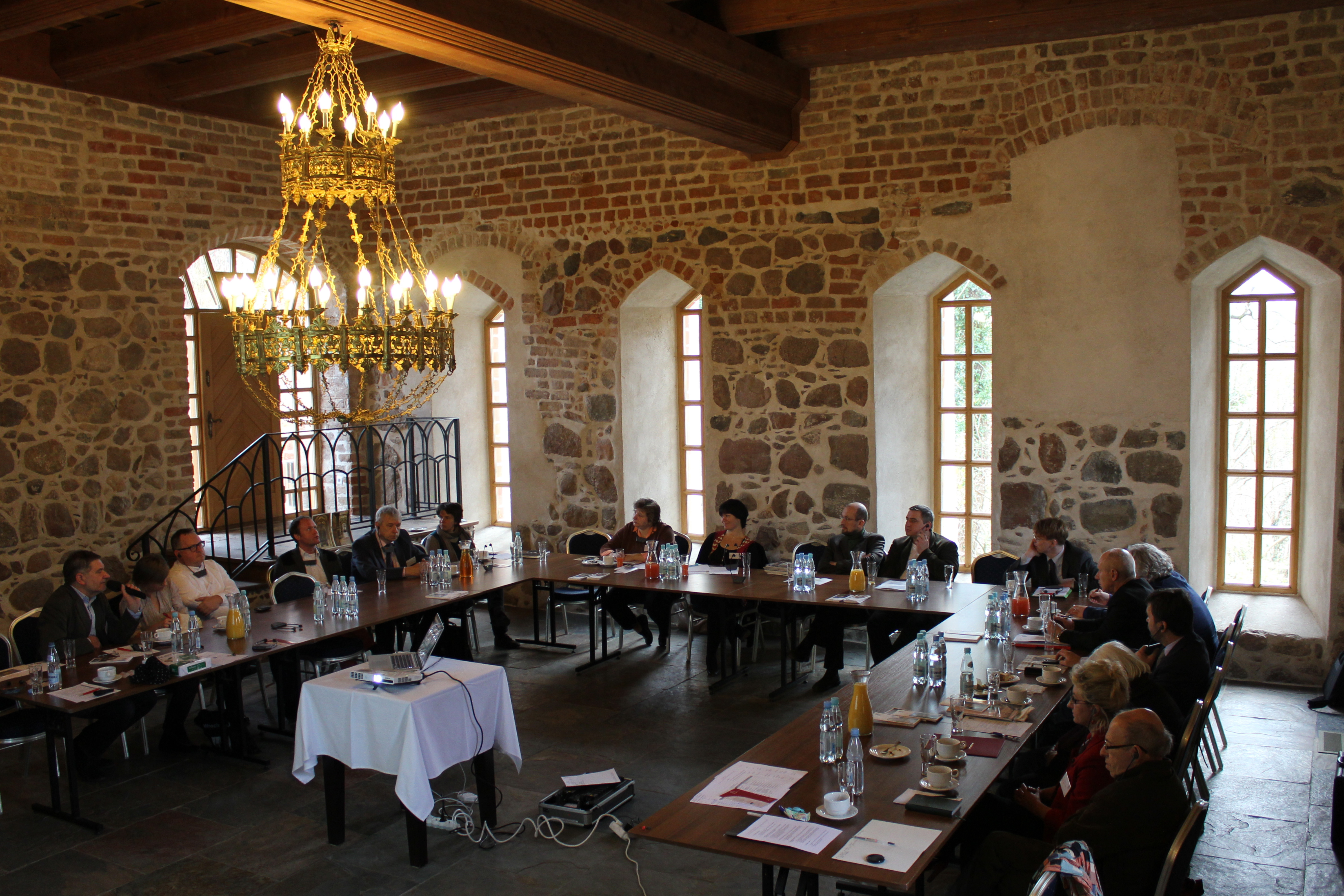 Die Teilnehmer des Netzwerktreffens des Deutsch-Polnischen Klosternetzwerks in Zehden (Cedynia)